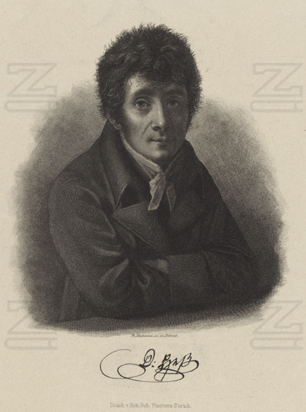 David Hess (Radierung) (1770-1843)